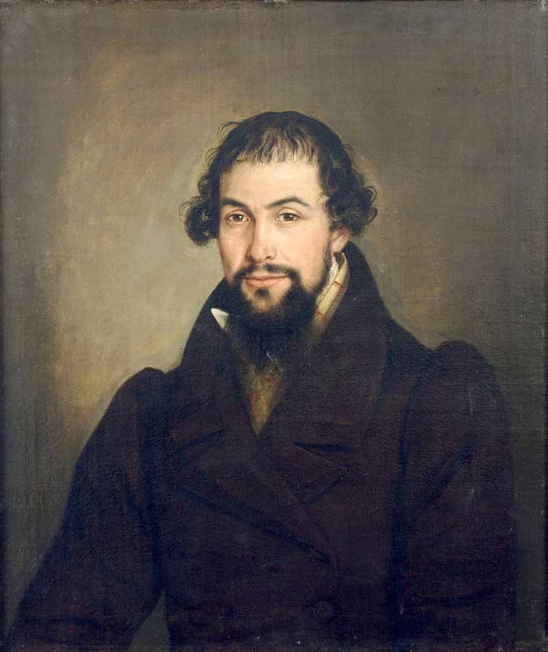 Мыльников Николай Дмитриевич «Портрет Ивана Семеновича Соболева» (ярославский купец, середина XIX века) 1830-е холст, масло. 73*62 Ярославский художественный музей